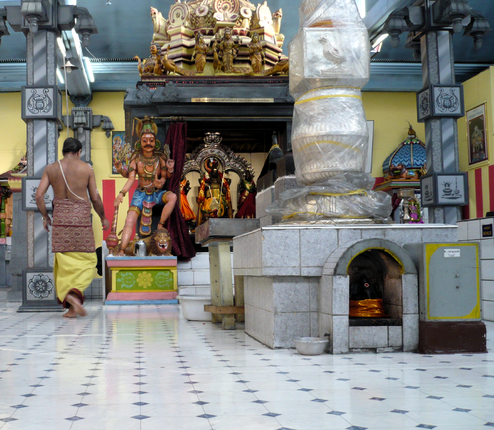 De tamilisch Murugan-Tempel z Adlischwiil. Foto vom al-Qamar, Wikipedia